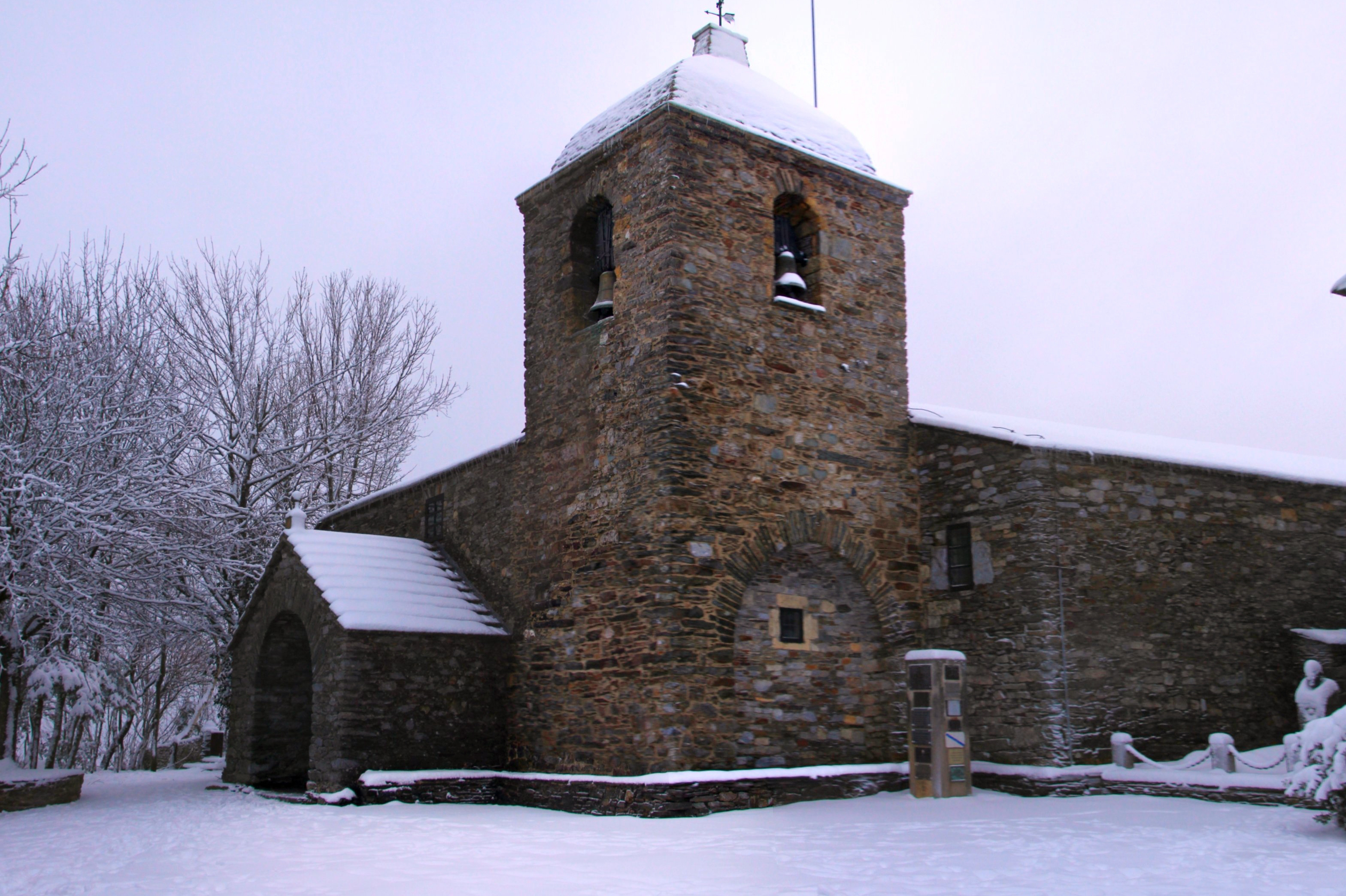 Pedrafita do Cebreiro, Galiza